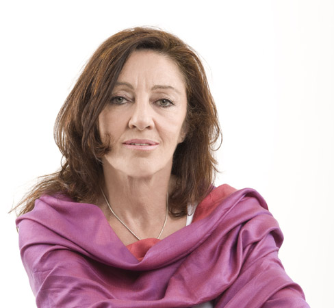 Retrato fotográfico de Diane Denoir.